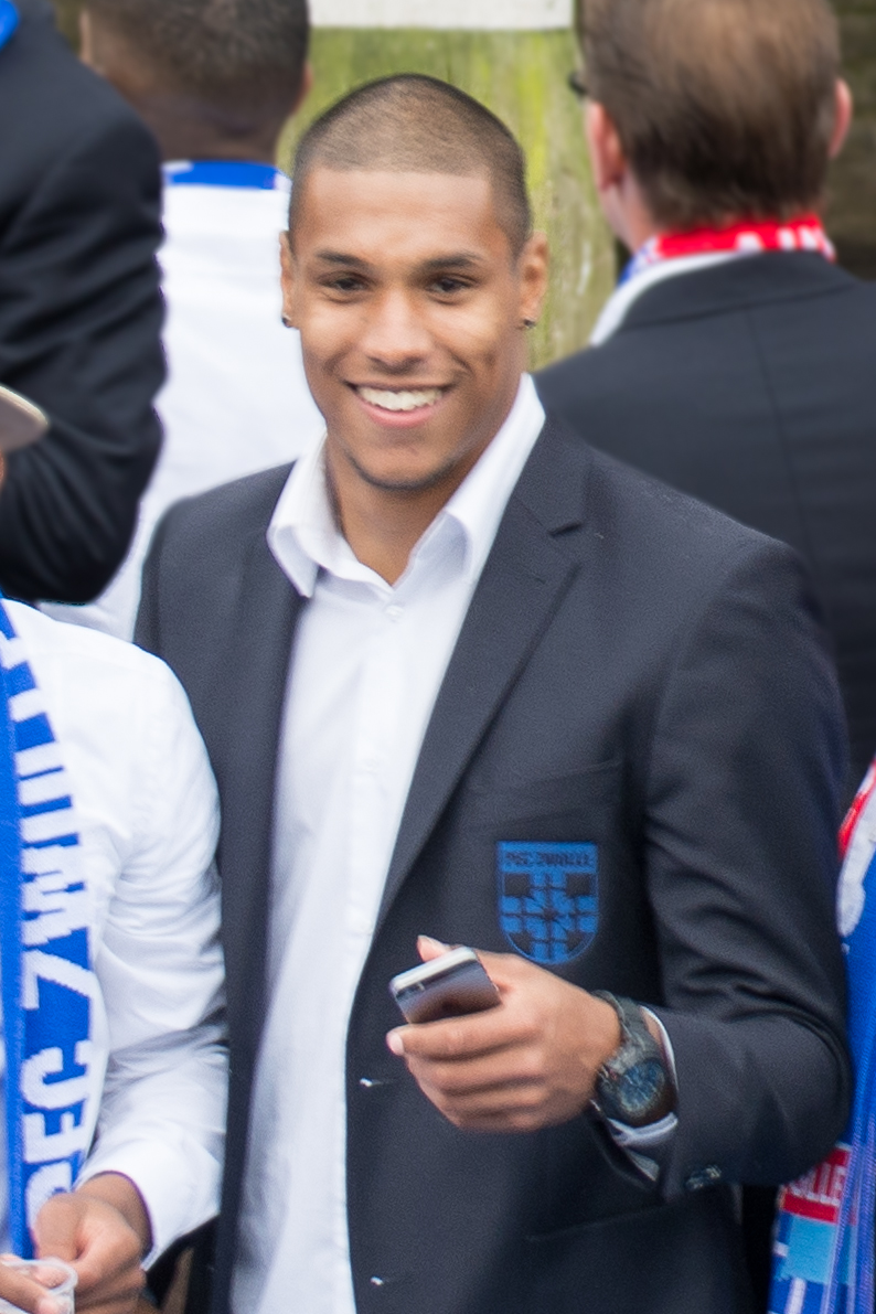 Daryl Lachman tijdens de hulding van de KNVB beker op de Zwolse stadsgracht.